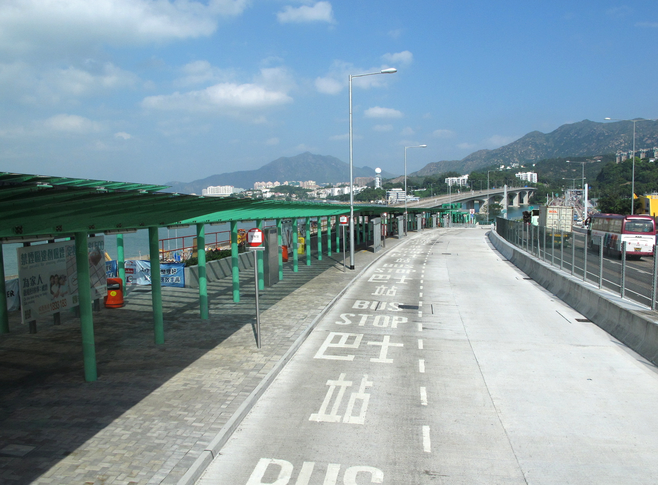 Tuen Mun Road Bus Interchange Tuen Mun Direction